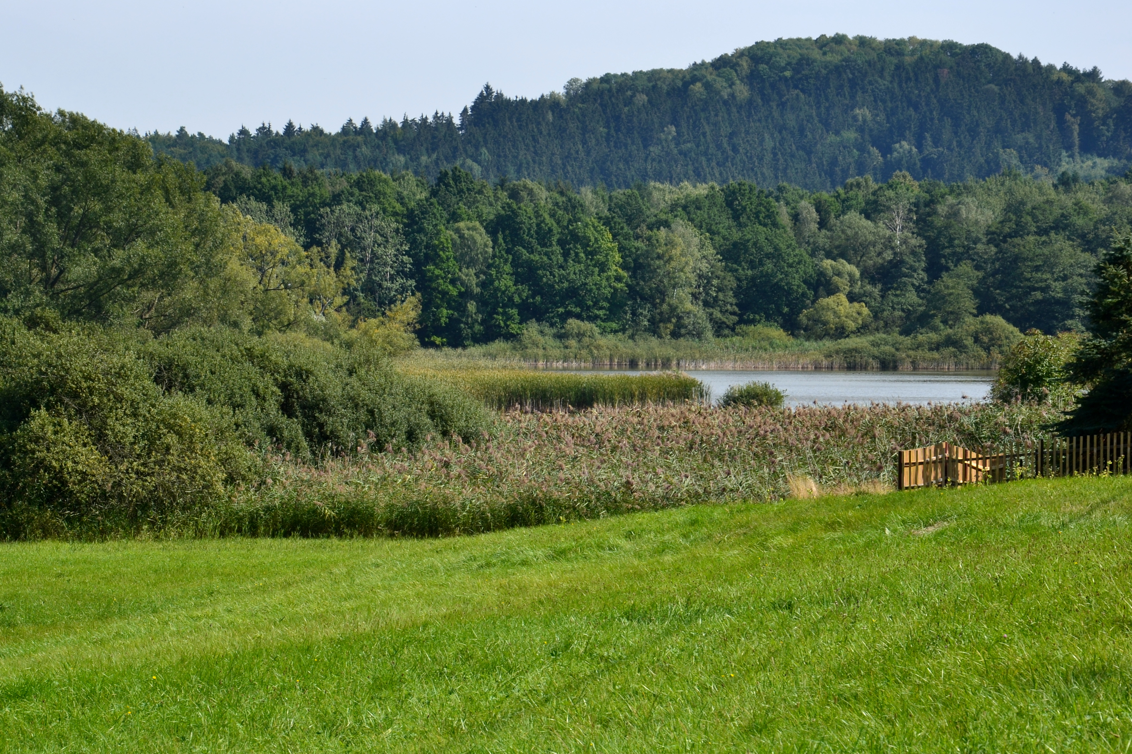 PR Stará Oleška – západní část chráněného území